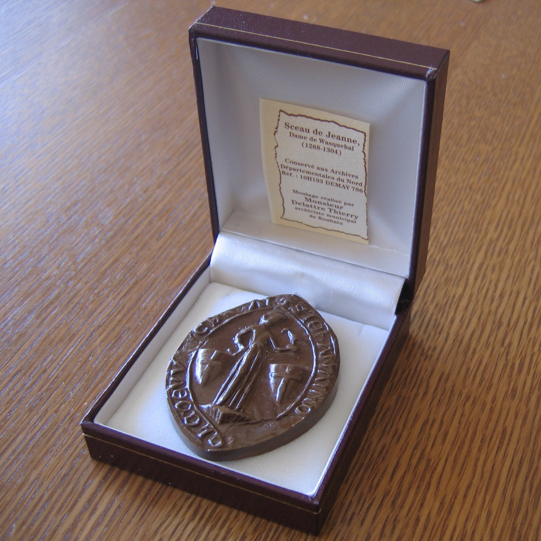 Sceau de Jeanne, Dame de Wasquehal (1268-1304).